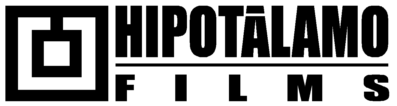 Logotipo de la productora de cine Hipotálamo Films